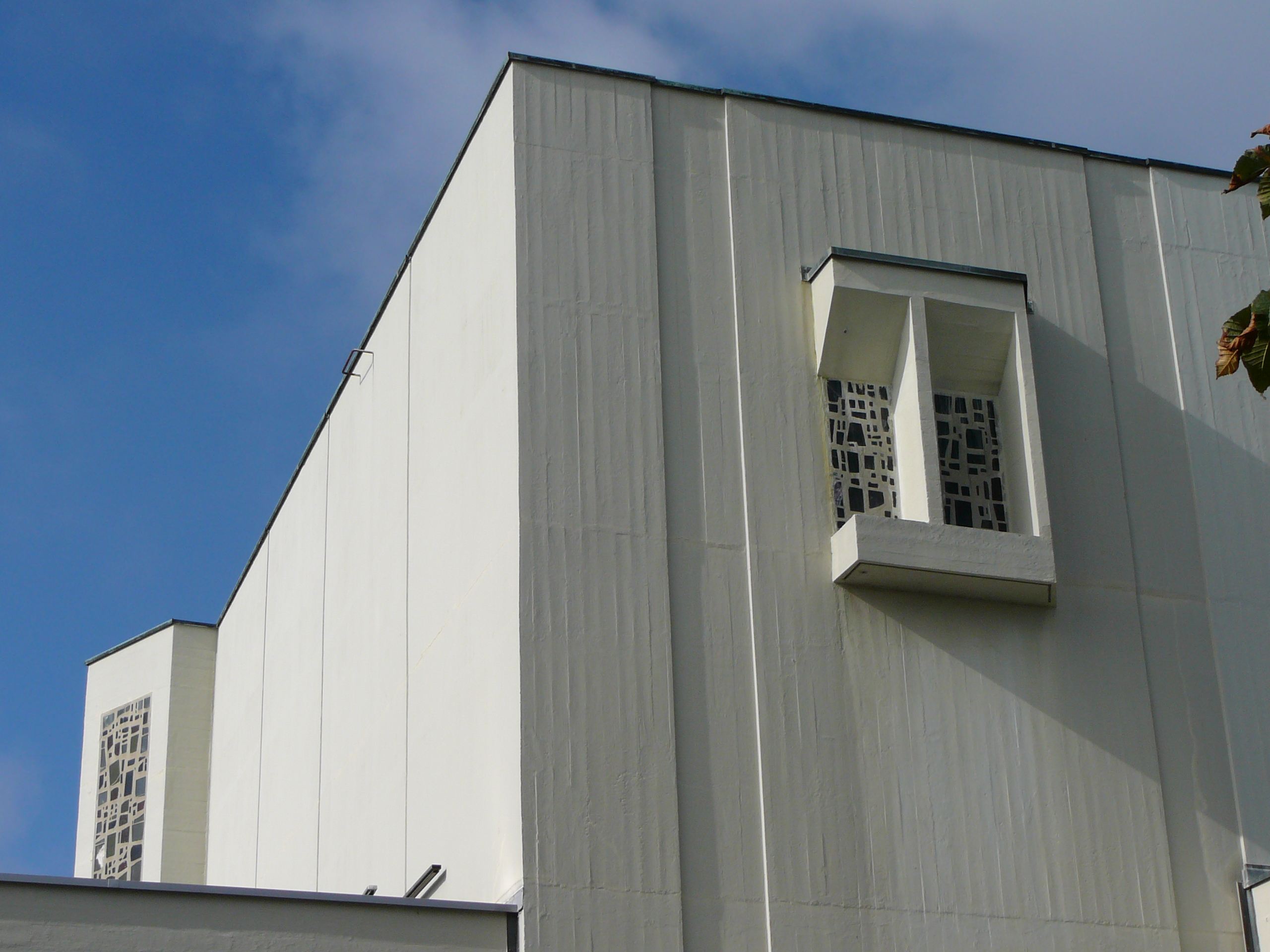 Römisch-katholische Pfarrkirche St. Mauritius Oberengstringen, Kirchenfenster an der süd-östlichen Kirchenfassade